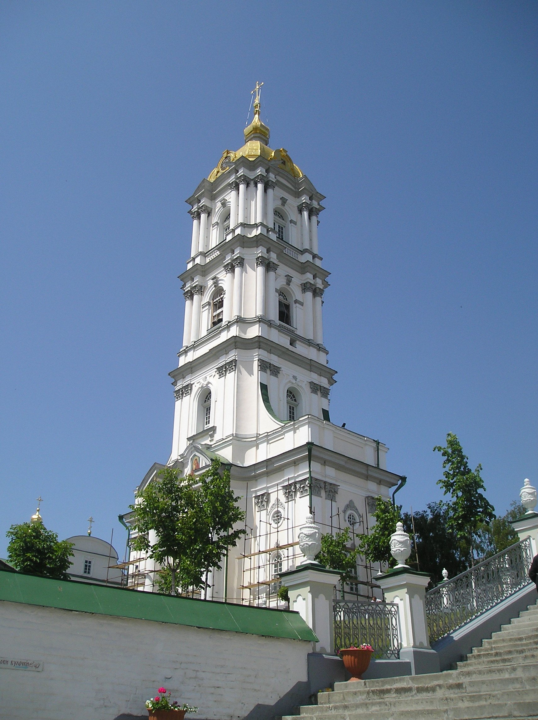 Ławra Poczajowska